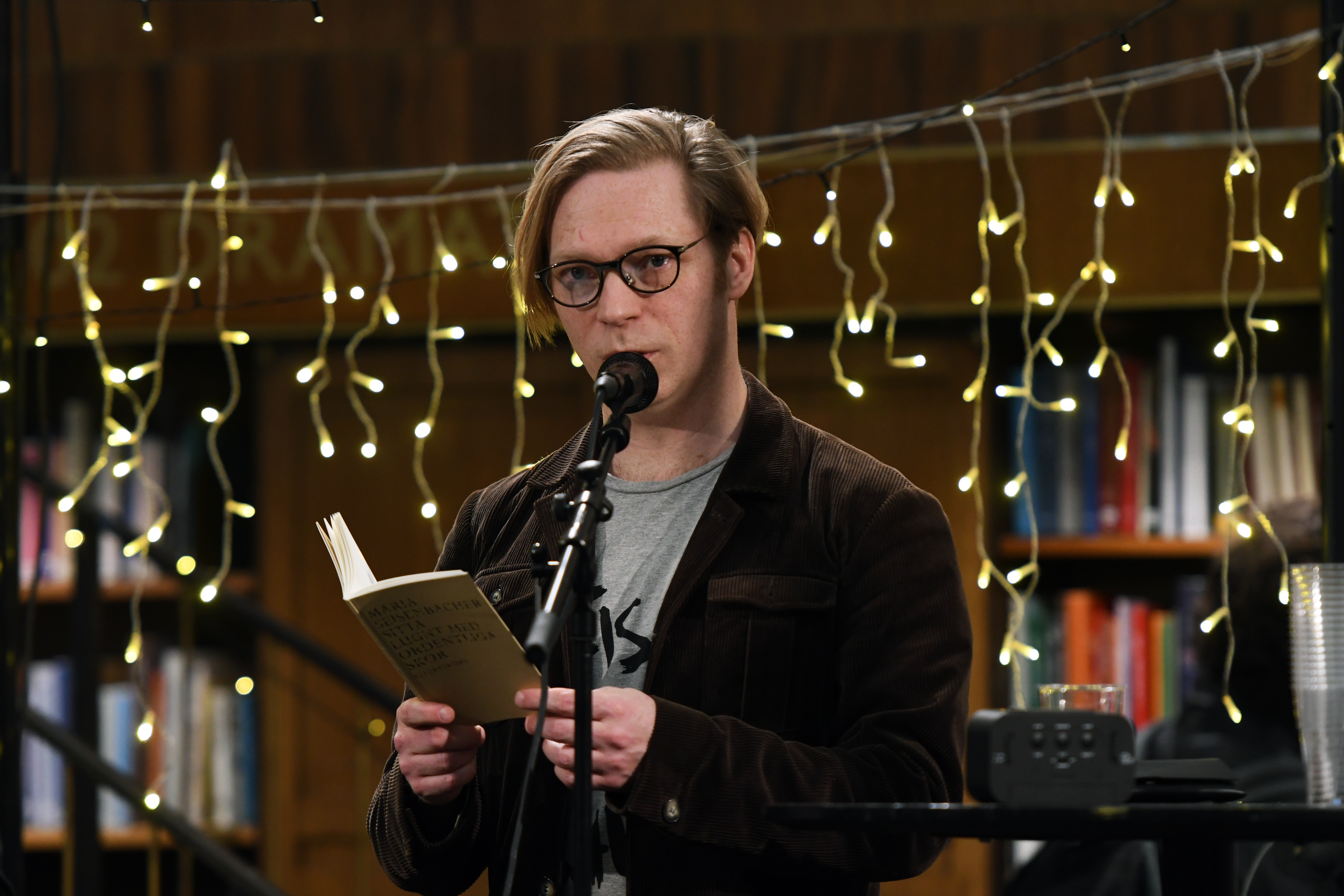 Poesimässan 2019, Stockholms stadsbibliotek. Översättaren Daniel Gustafsson läser ur Maria Seisenbachers diktning.